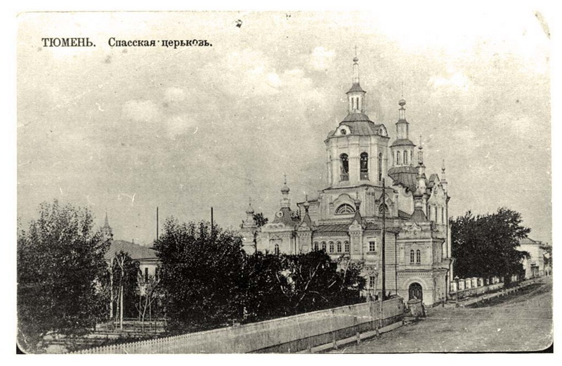 Дореволюционная фотография с видом Спасской церкви в Тюмени после реконструкции по проекту Б. Б. Цинке.